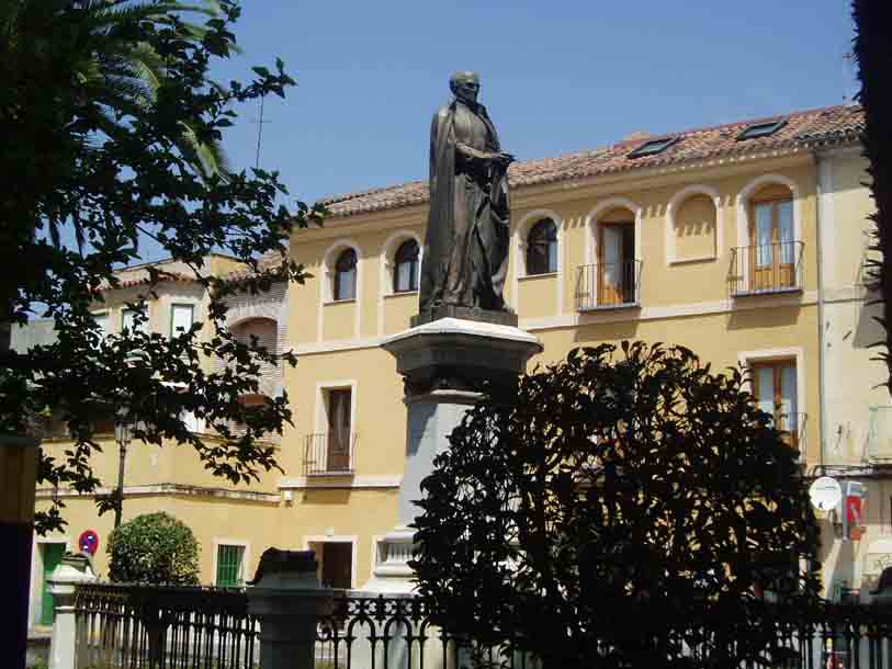 Juan de Mariana, Historiador, Talavera de la Reina (Spain) 1536-1624